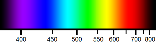 El espectro de la luz y sus longitudes de onda en nanómetros (nm)[1]